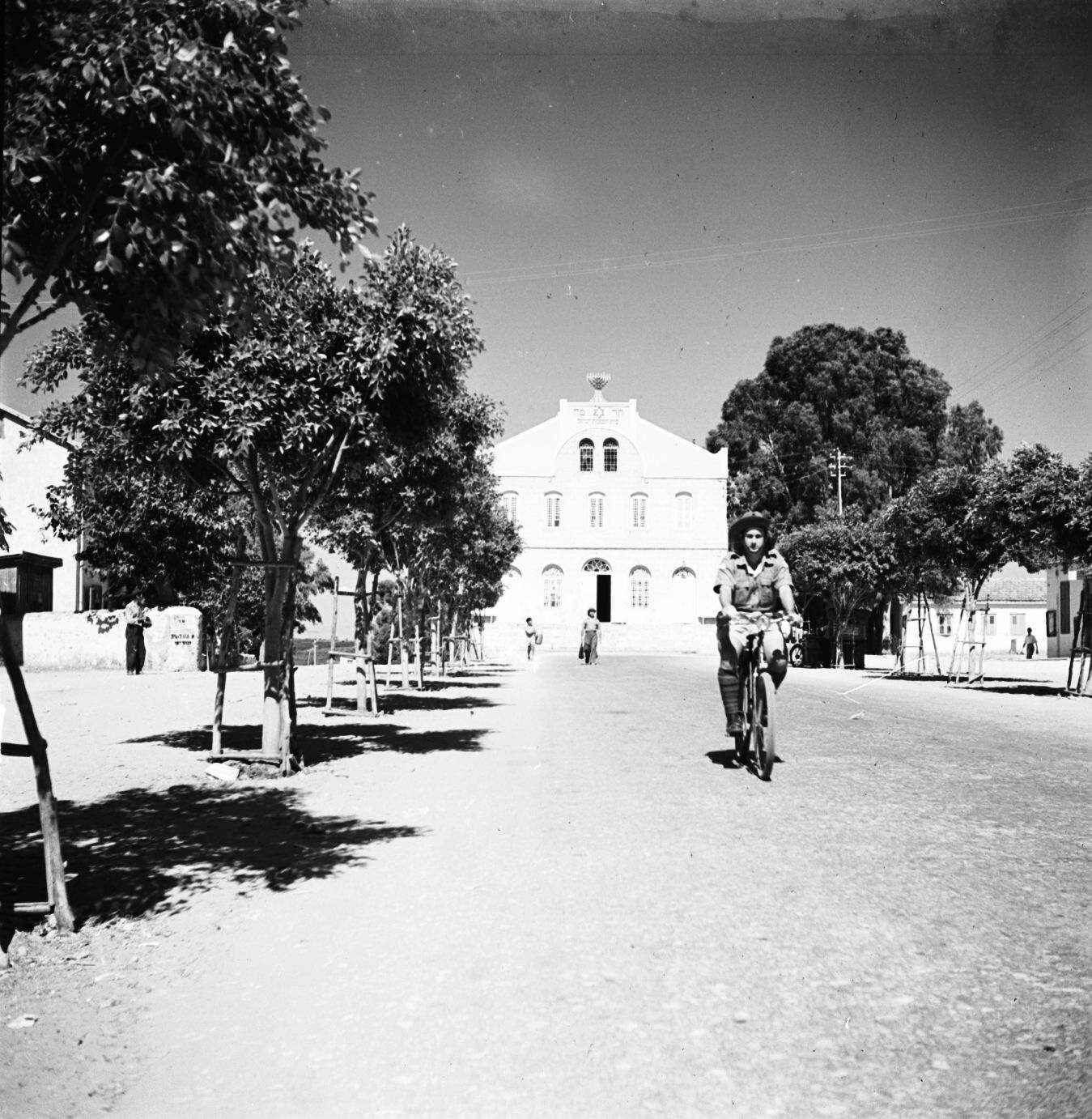 אוסף צילומים של הצלם זולטן קלוגר טווח מספרי התשלילים 18992 - 19083: Royal Army Service Corps חיל אספקה (תובלה)